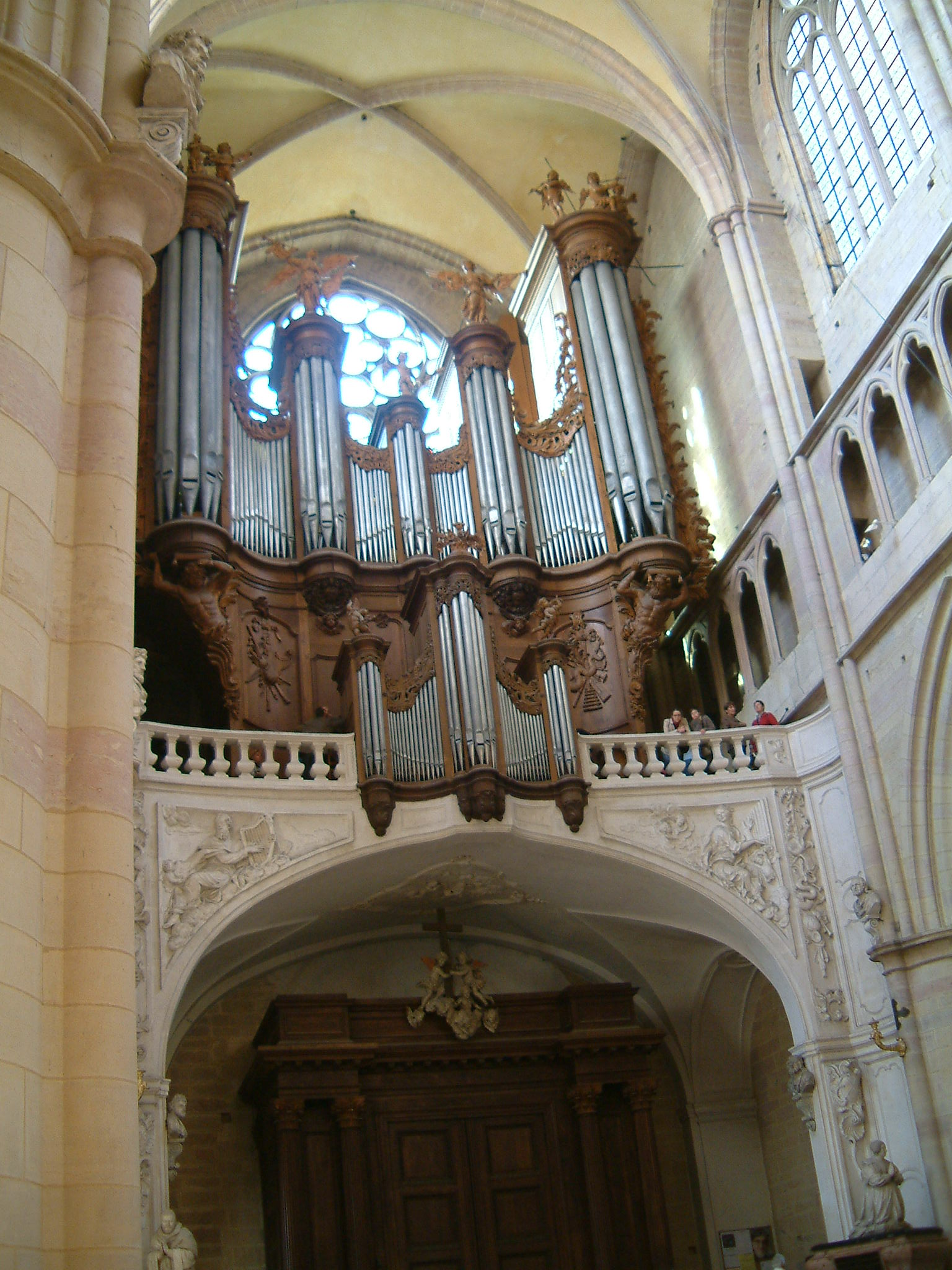 Orgues, Cathédrale Saint-Bénigne, Dijon, Bourgogne, FRANCE. Buffet du sculpteur Edme MARLET pour l'orgue des frères Charles-Joseph et Robert Riepp en 1743 dont c'est l'instrument le plus grand et le plus abouti; restauré en 1847 par Daublaine et Callinet et rétabli dans son état originel en 1996 par Gerhard Schmid de Kaufbeuren qui a toutefois regroupé les jeux hérités du XIXe siècle dans un Récit expressif. Buffet classé Monument Historique au titre objet depuis le 05-12-1908.